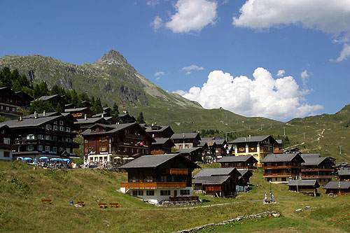 Bettmeralp mit Bettmerhorn, Schweiz (7. Juli 2003)